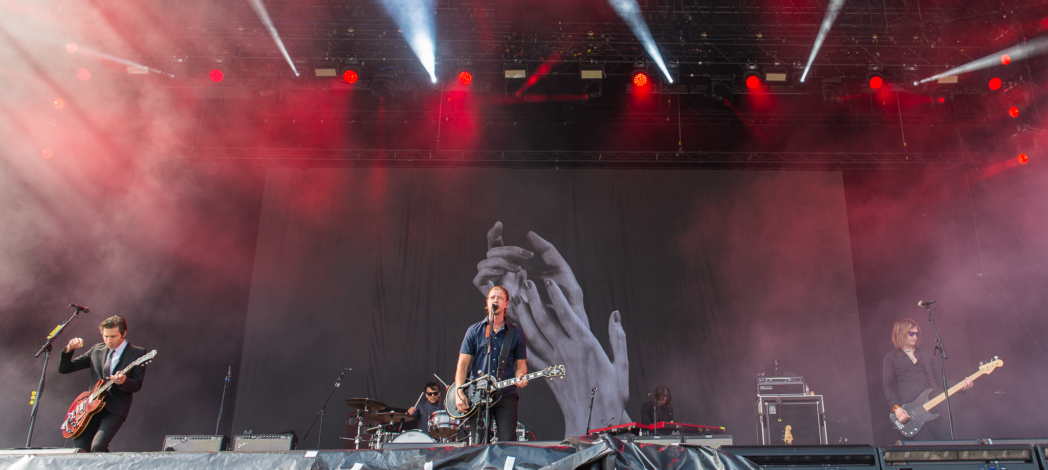 ARGO-Konzerte,Brad Truax,Brandon Curtis,Daniel Kessler,Festival,Interpol,Konzert,Livekonzert,Livemusik,Musik,Paul Banks,RiP,Rock im Park 2015,Samuel "Sam" Fogarino,Seat Zeppelin Stage